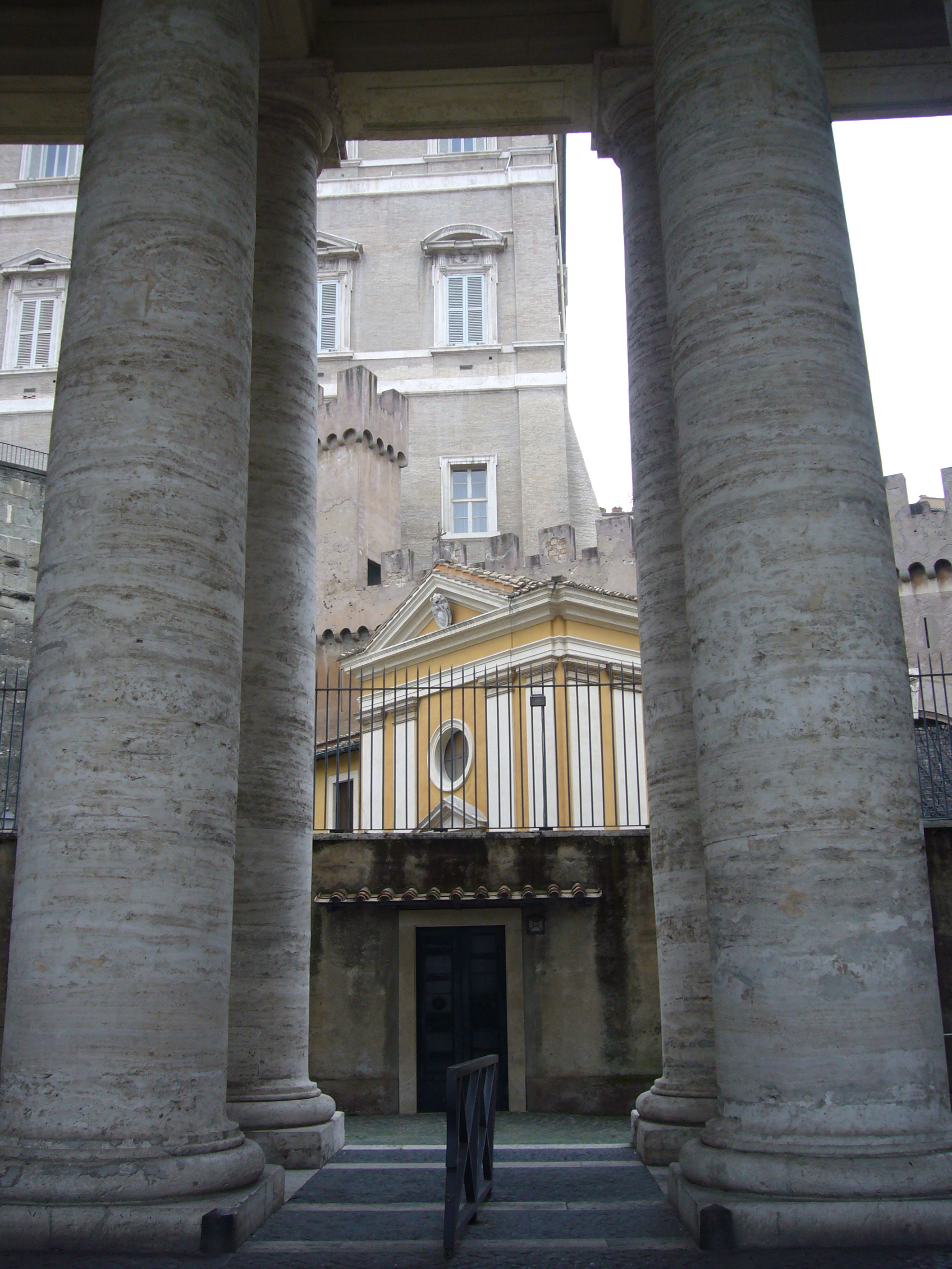 Roma, Città del vaticano: chiesa dei Santi Martino e Sebastiano degli Svizzeri